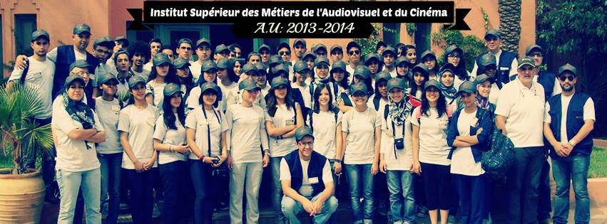 Octobre 2013